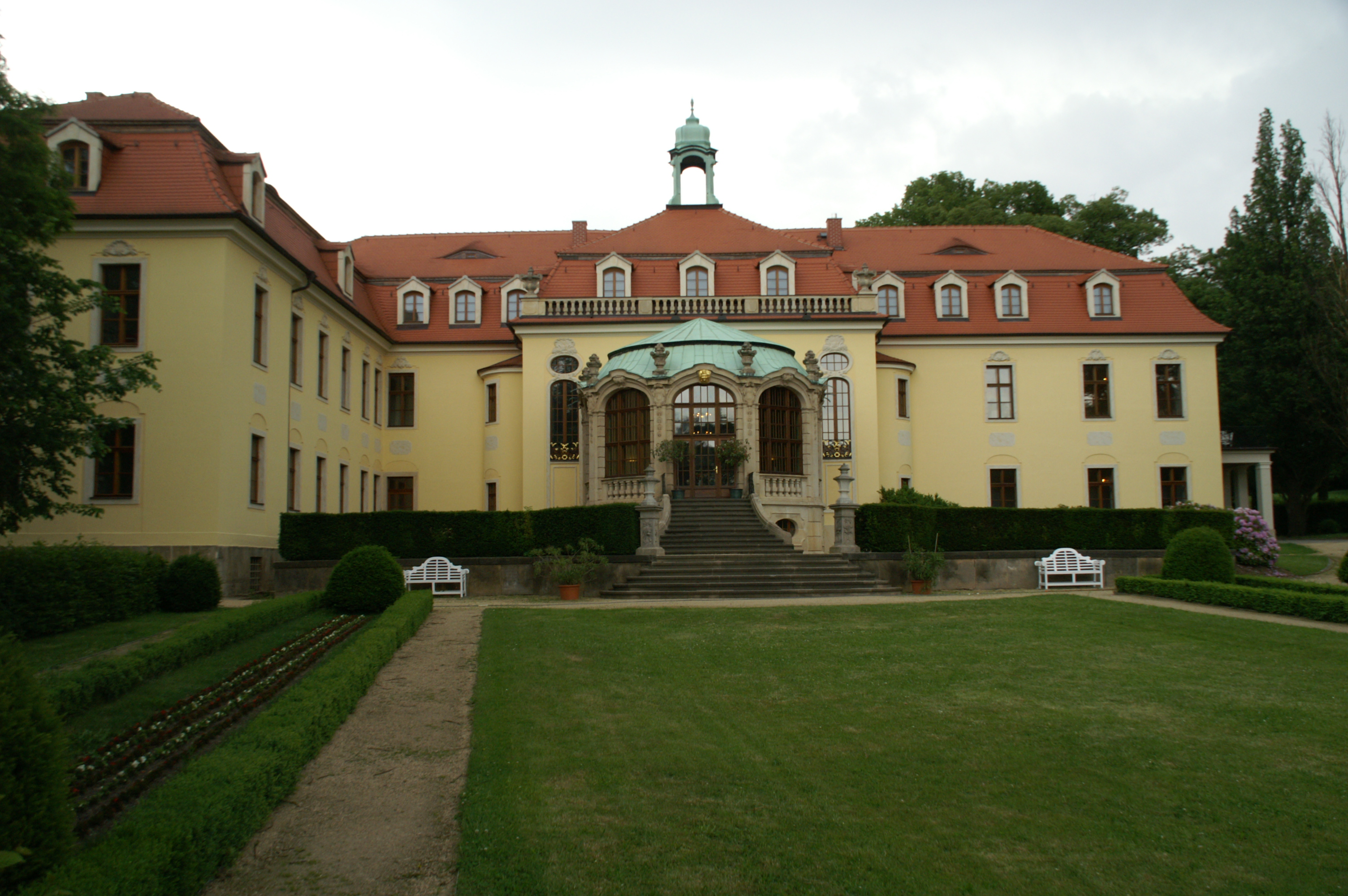 Schloss Proschwitz near Meißen, Germany